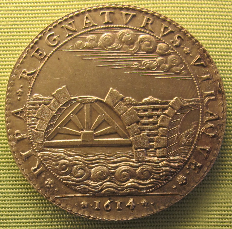 Nicolas briot o pierre regnier, luigi XIII, verso con costruzione del pont marie, 1614